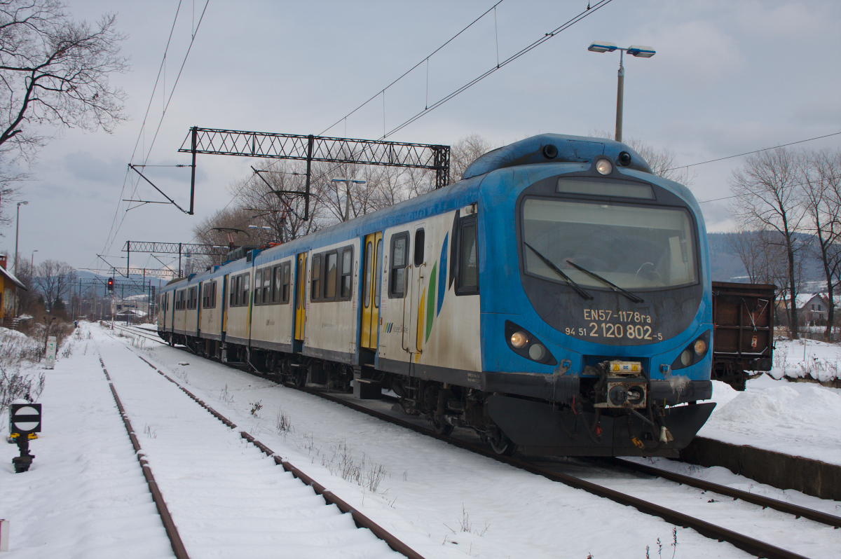 EN57-1178 w Węgierskiej Górce, pociąg Kolei Śląskich z Katowic do Węgierskiej Górki